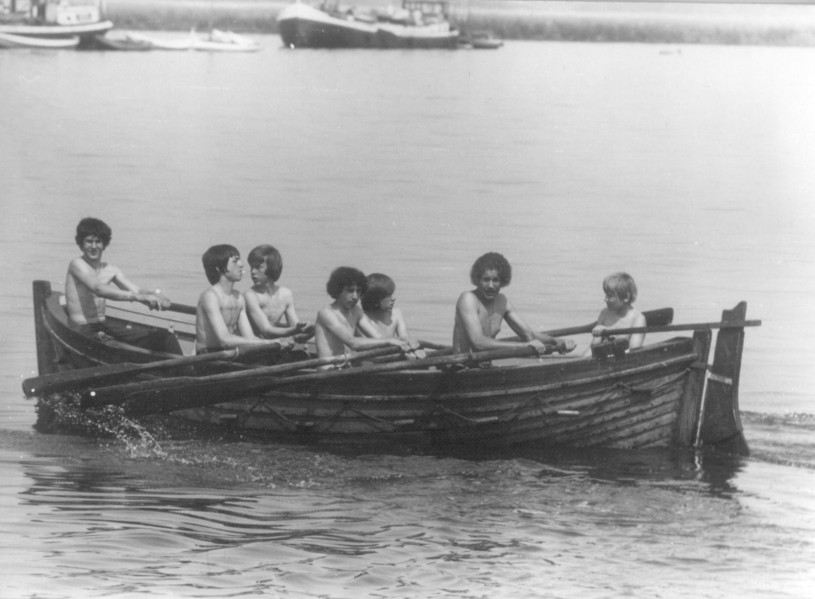 Sloep van de Lischgroep roeiend in 't Noorder Gat van de Visschen. De oude sloep van de coaster Fiducia, die in de nacht van 13 maart 1963 op de stenen van de Zuiderpier bij Hoek van Holland was gelopen. In 1964 aangekocht en 10 mei 1964 van de Berghaven naar Rotterdam gevaren.